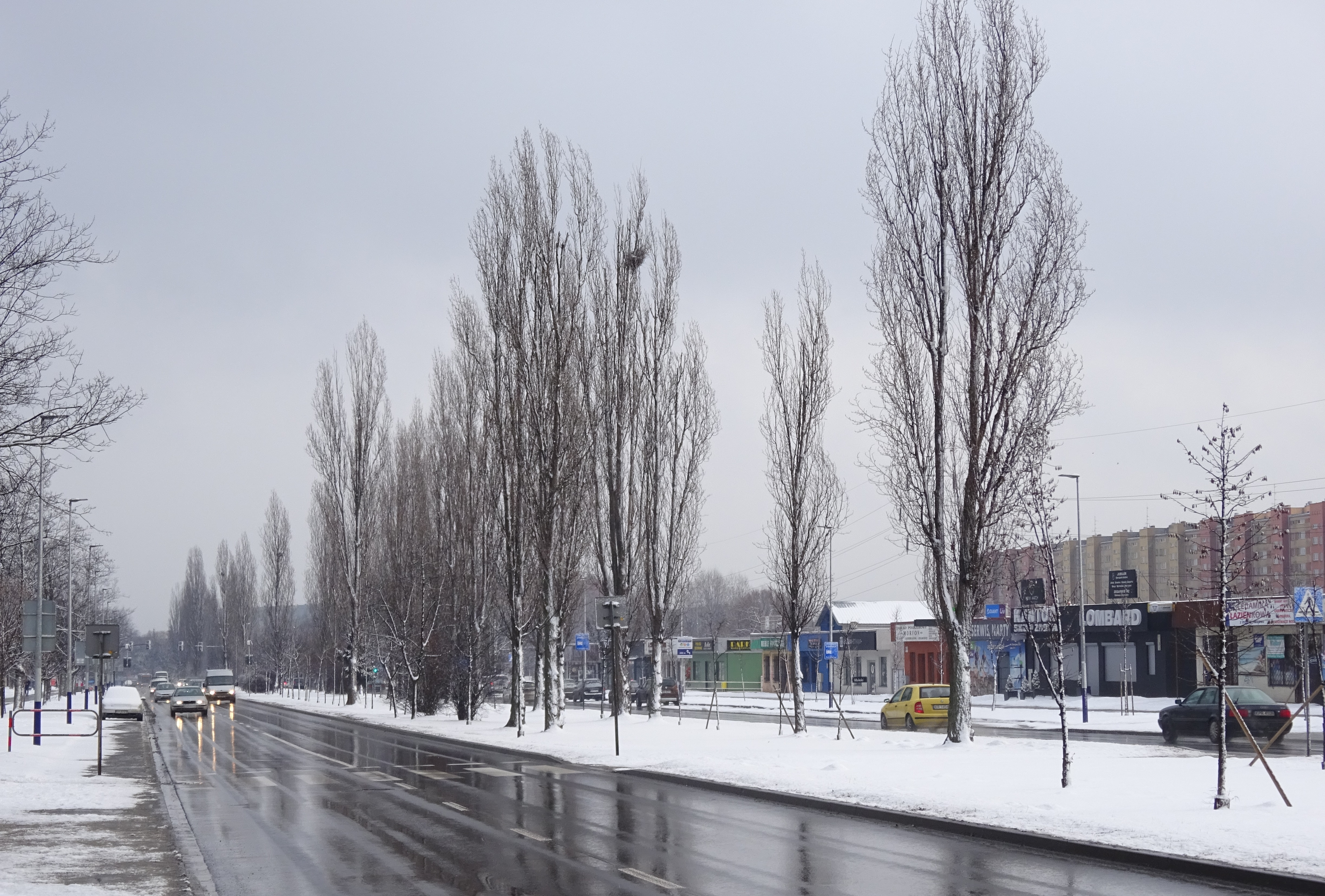 Aleja gen. Władysława Andersa w Krakowie. Widok na wschód w zimowej scenerii.